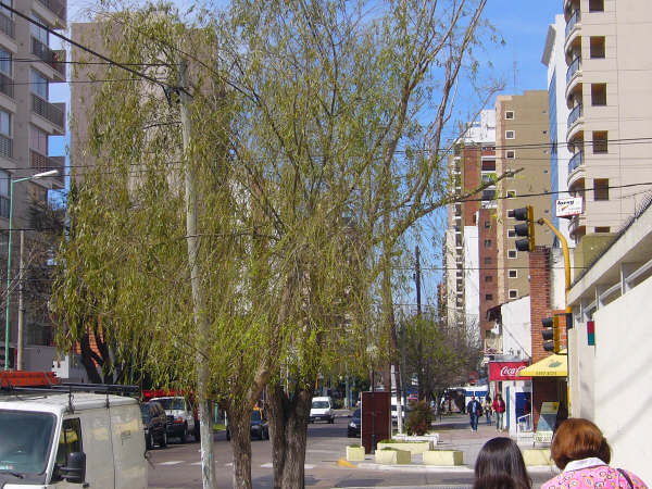 Vista de la Calle Colombres, en Lomas de Zamora, Buenos Aires, Argentina